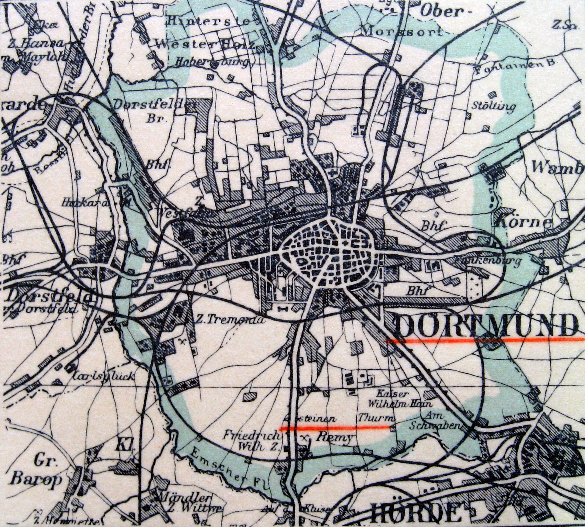 Dortmund, Stadtplan 1894